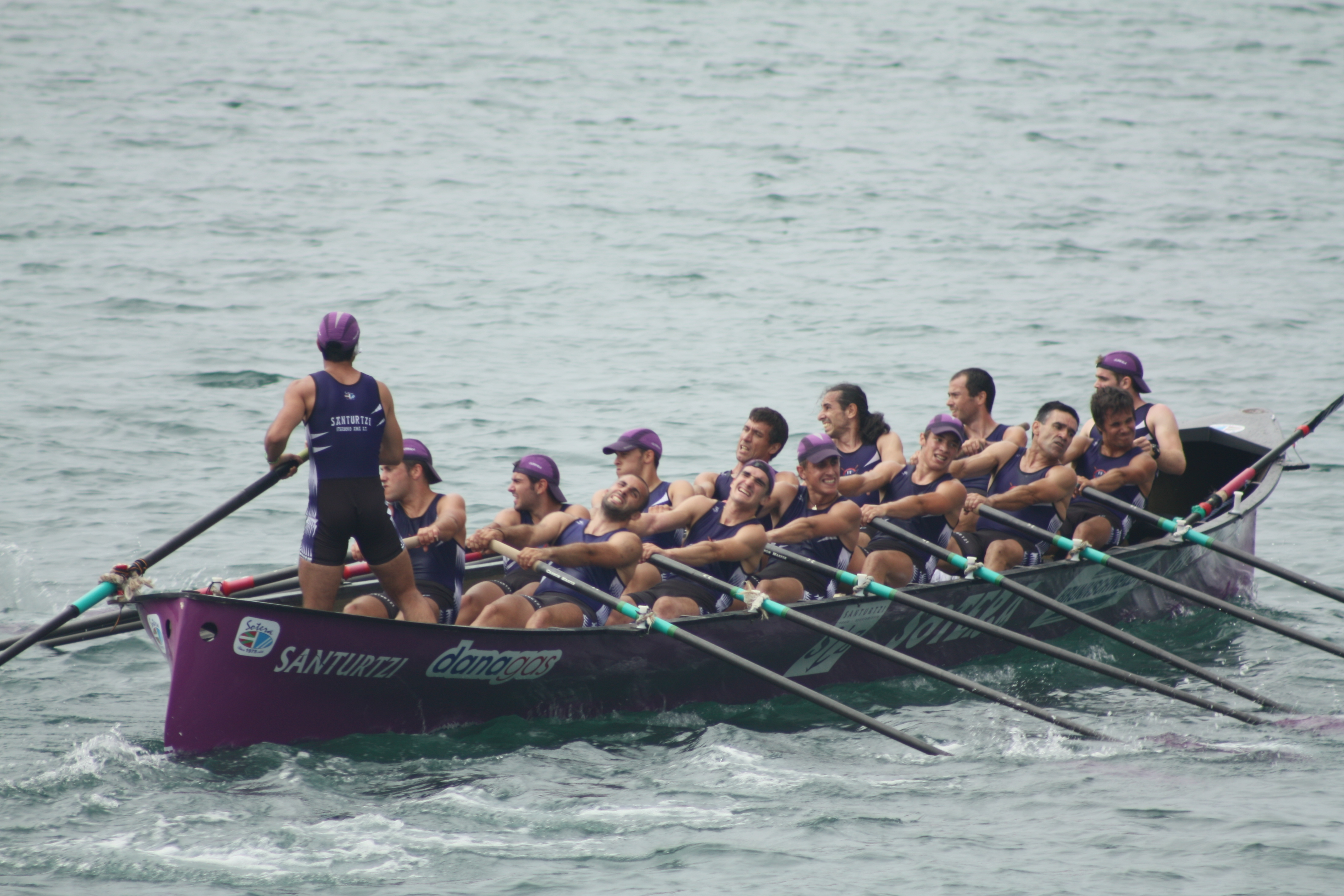 San Pedro en la Bandera de Santander 2013 de la liga ARC-2